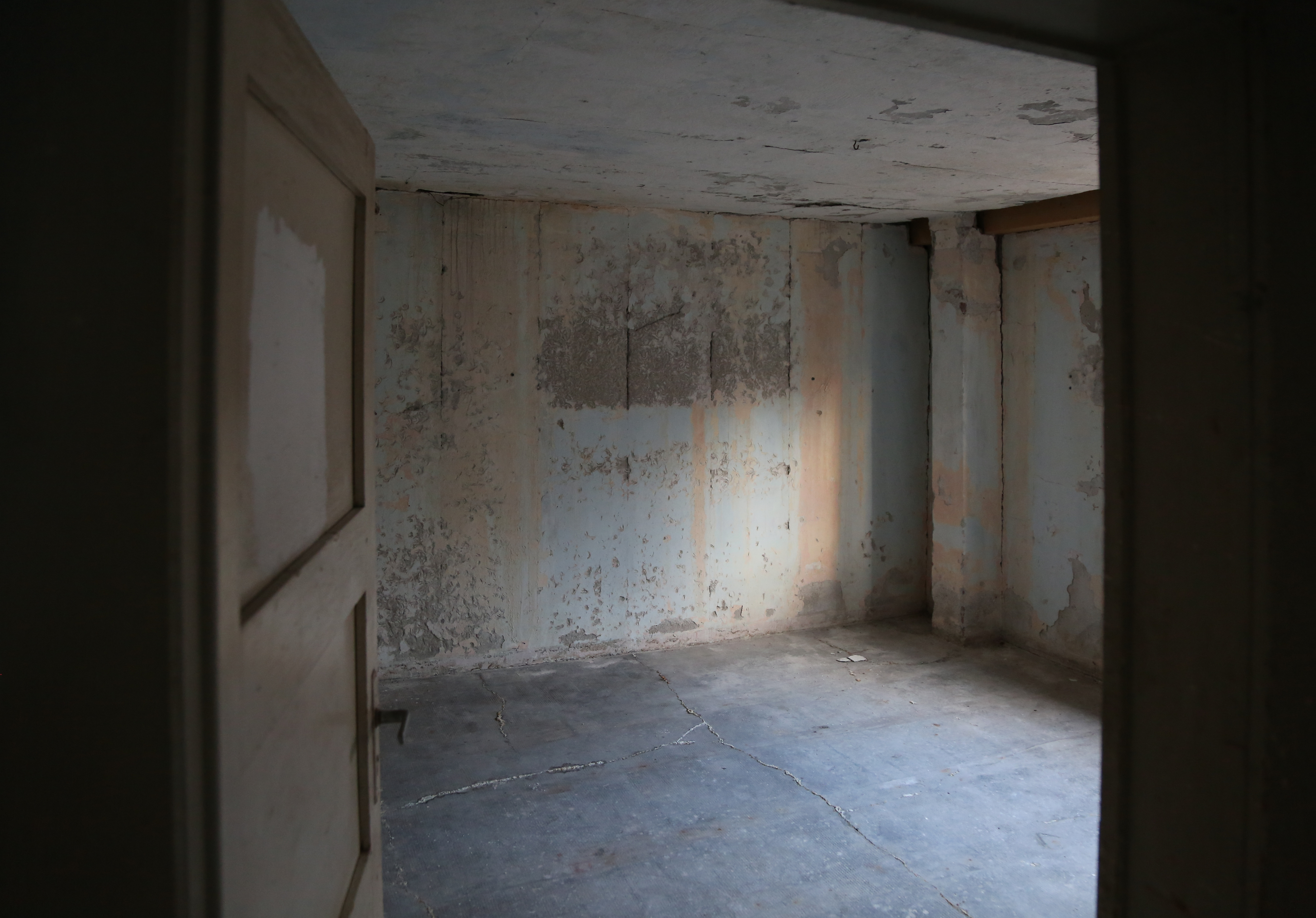 Zwangsarbeiterlager Neuaubing der Deutschen Reichsbahn. Im Lager lebten von Mai1942 bis Mai 1945 Zivilarbeiter und Zwangsarbeiter aus West- und Osteuropa, die im Reichsbahnausbesserungswerk Neuaubing ausgebeutet wurden. Im Bild das Innere von Baracke 5, der künftigen Gedenkstätte.